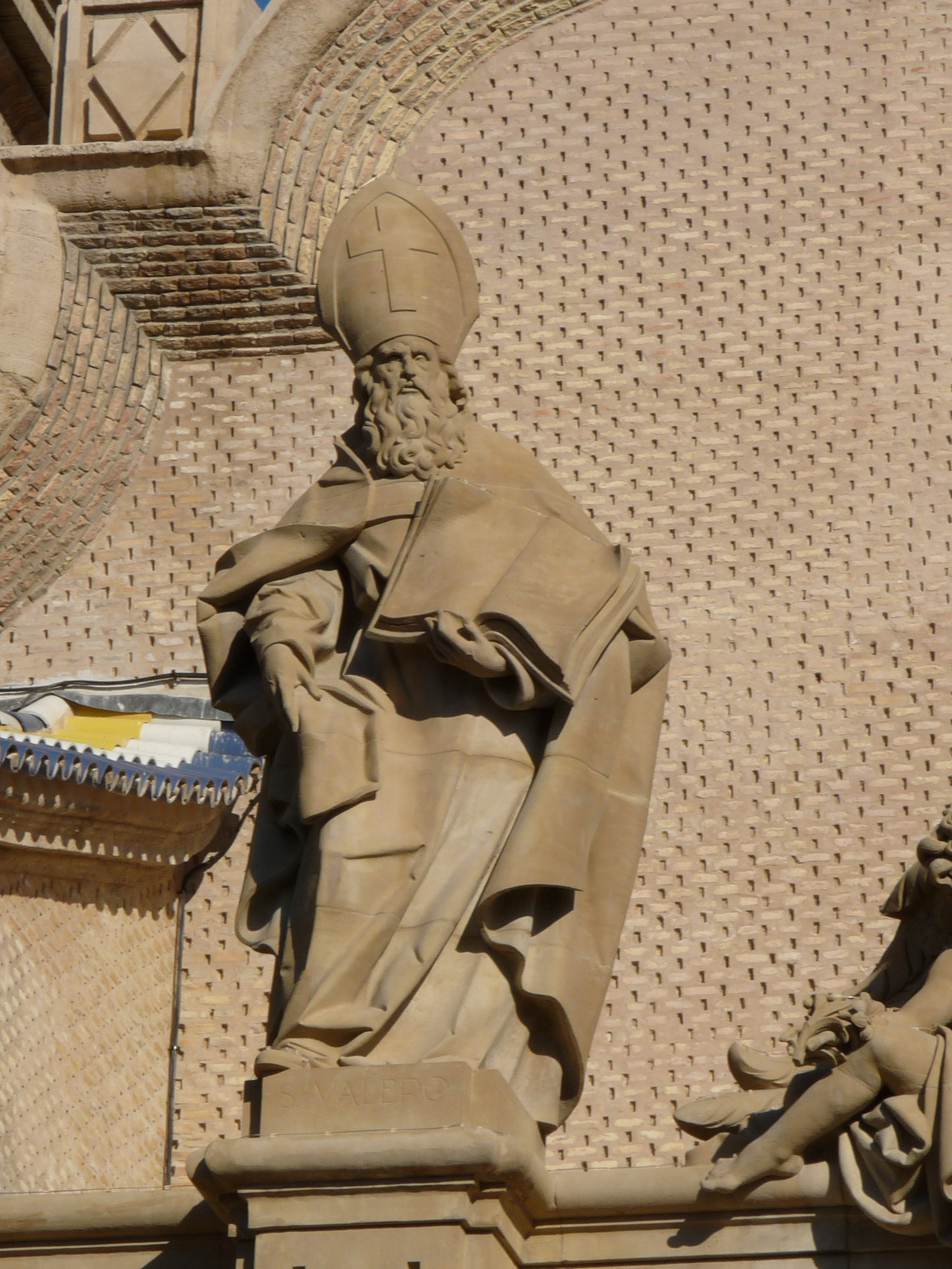 Zaragoza - El Pilar - Fachada - San Valero